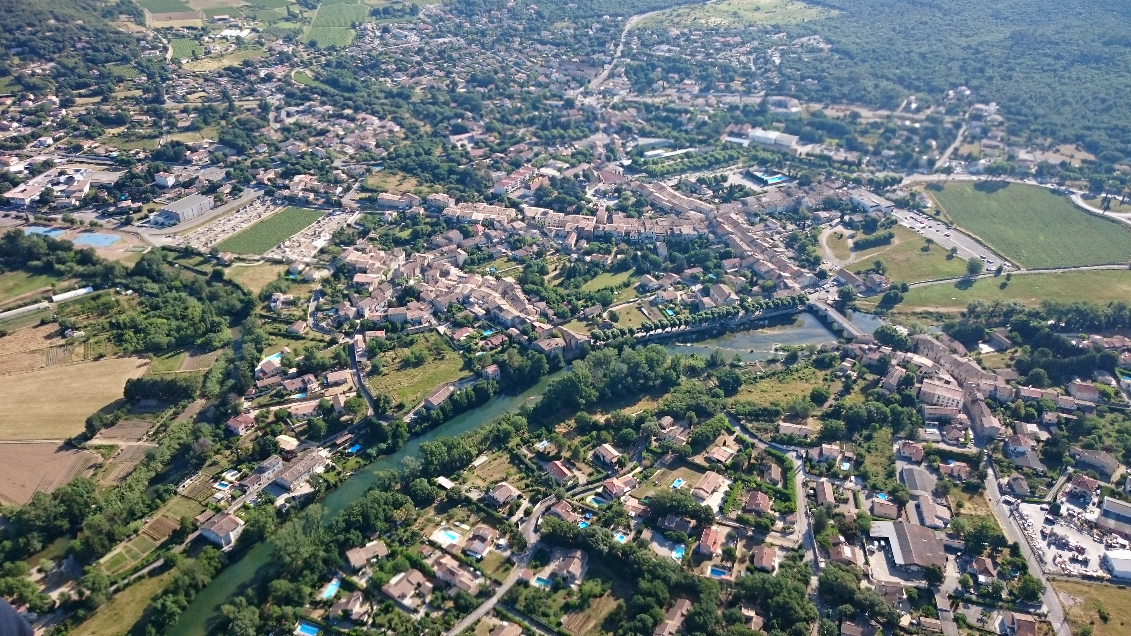 Vue aérienne ( ULM ) du village de Quissac ( Gard - Occitanie )